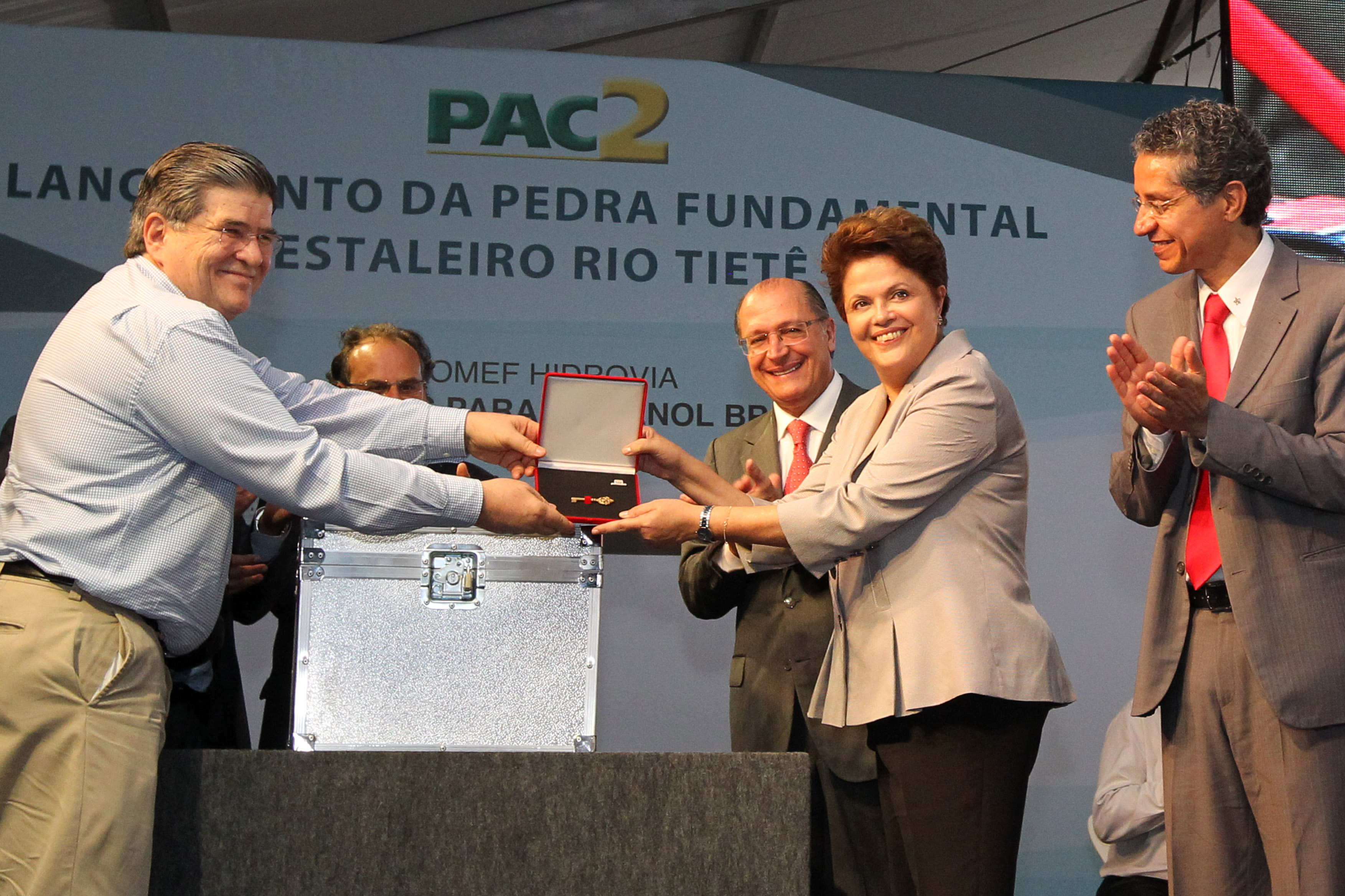 Presidenta Dilma Rousseff, participa da cerimônia de lançamento da pedra fundamental da construção do estaleiro Rio Tietê. (Araçatuba - SP, 13/09/2011)